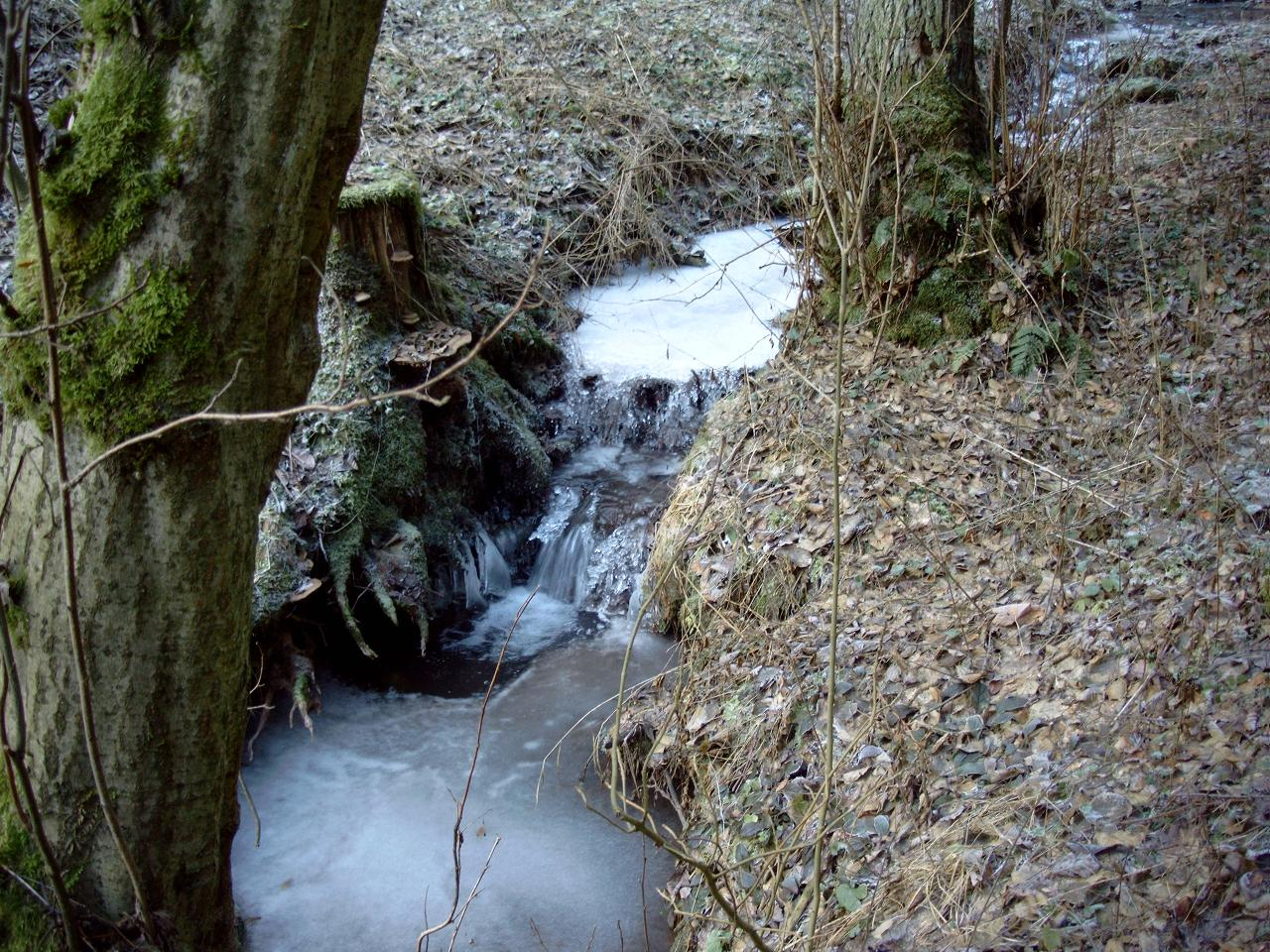 Blambach